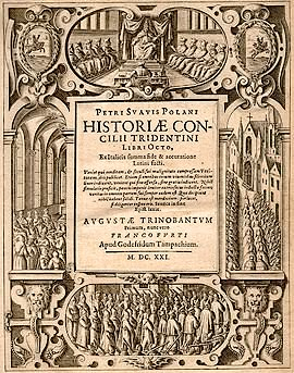 Paolo Sarpi: Historia Concilii Tridentinii